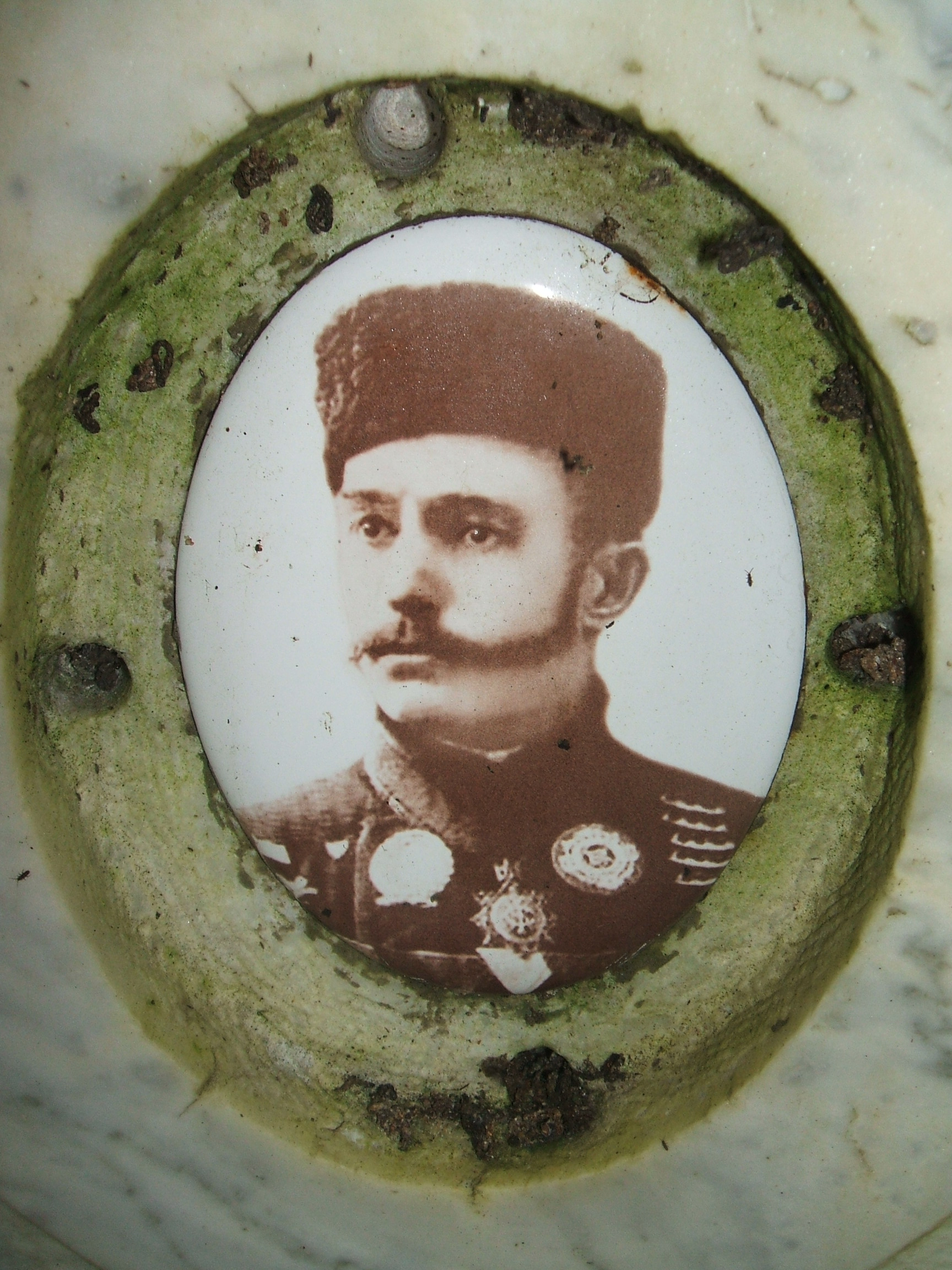 фото Паншина на памятнике Сестрорецкого кладбища